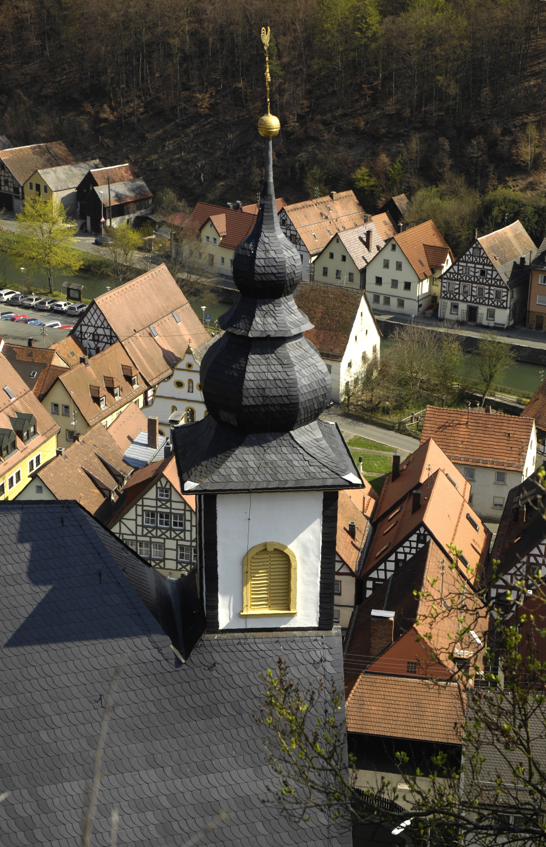 Waischenfeld, Blick vom Schlossberg über die Kirche in die Stadt und ins Wiesenttal